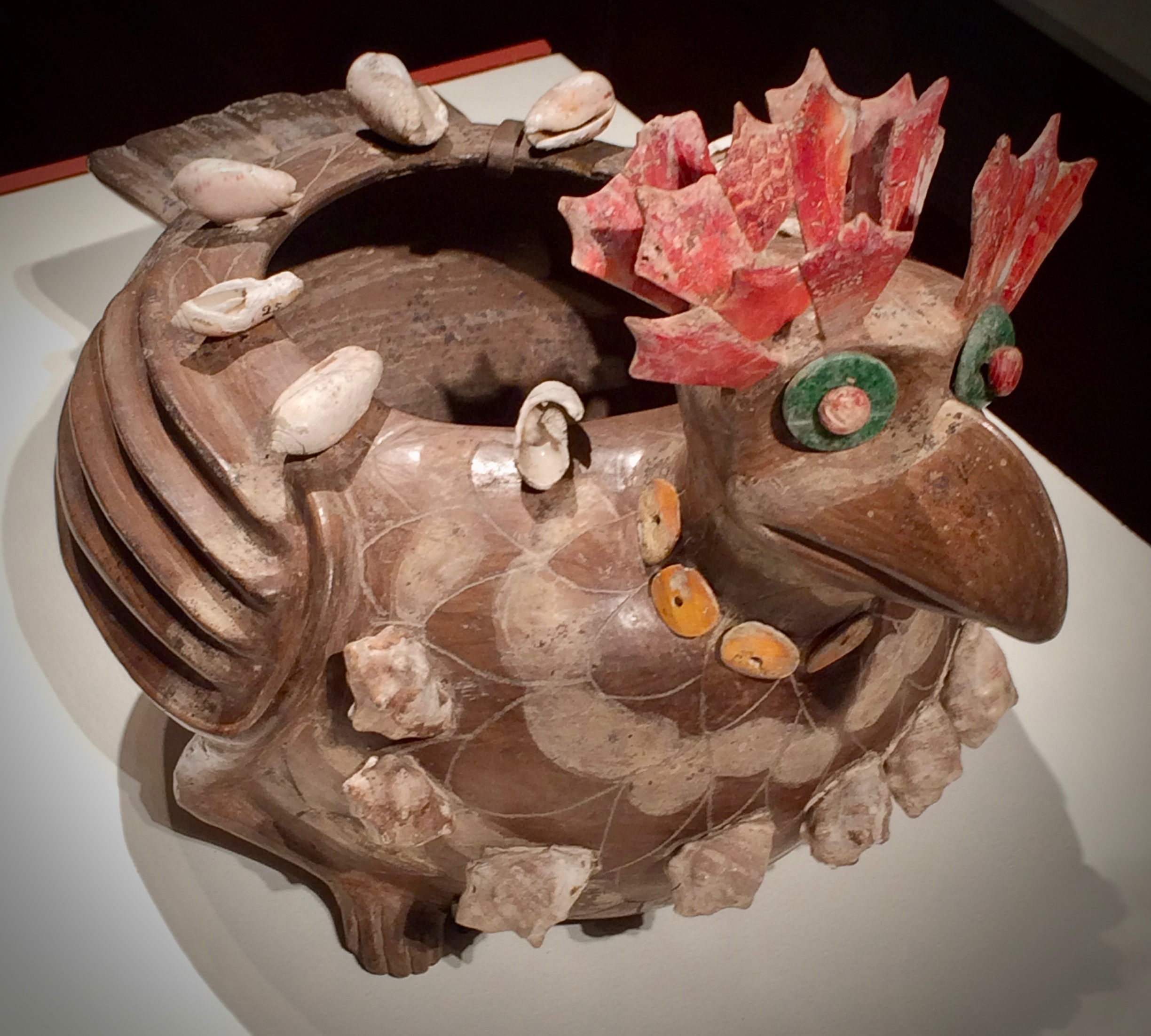 Avian effigy vessel, 250-350 AD. Ceramic, shell, greenstone & stucco. INAH No. 10-80489 La Ventilla, Teotihuacan